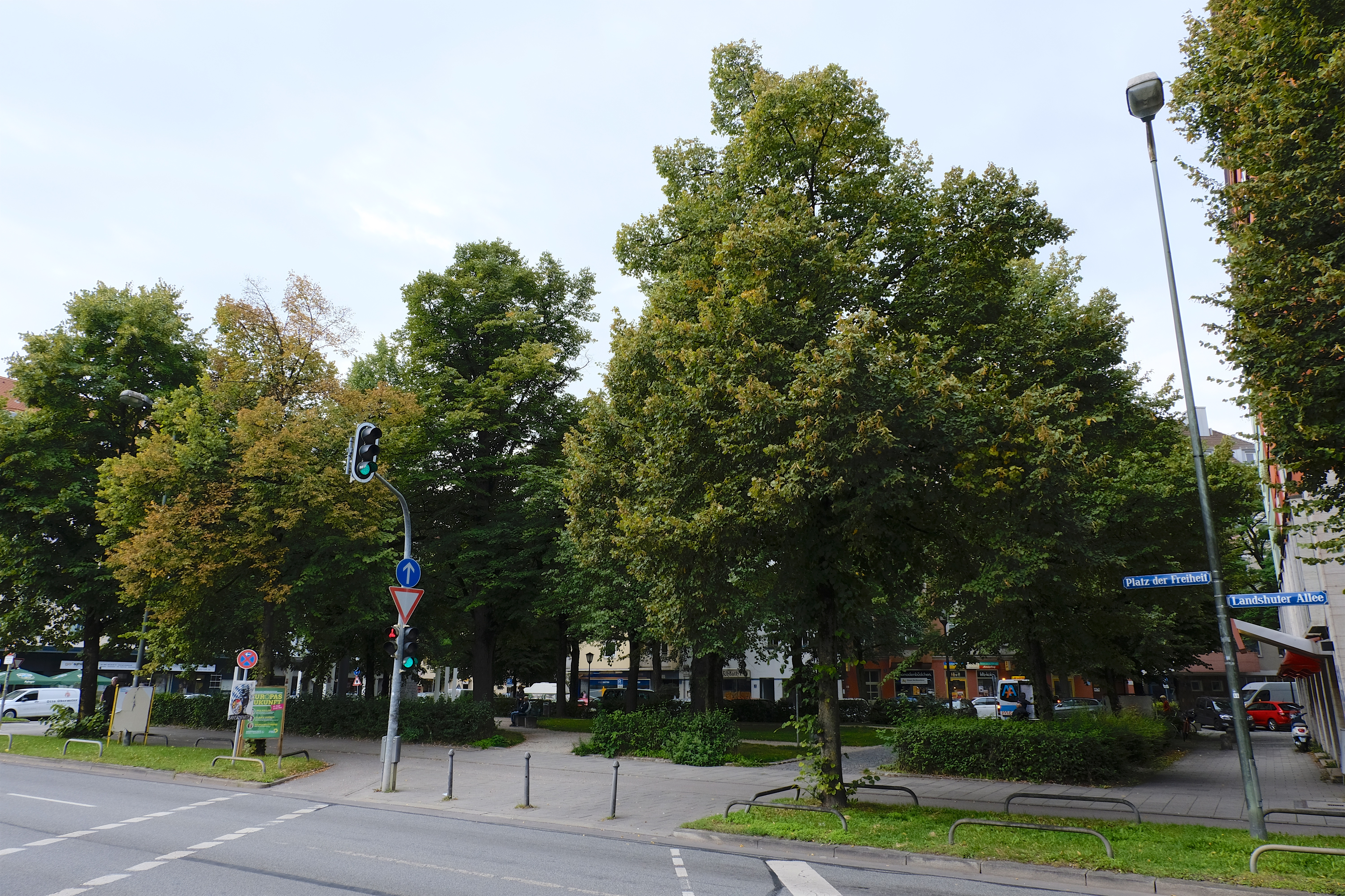 Platz der Freiheit, München, Deutschland gesehen von der Landshuter Allee